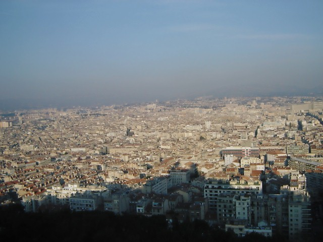 Marselha, França. Segunda maior cidade francesa, situada na região PACA(Provence-Alpes-Côte d´Azur). Vista da igreja Notre Dame de La Garde.